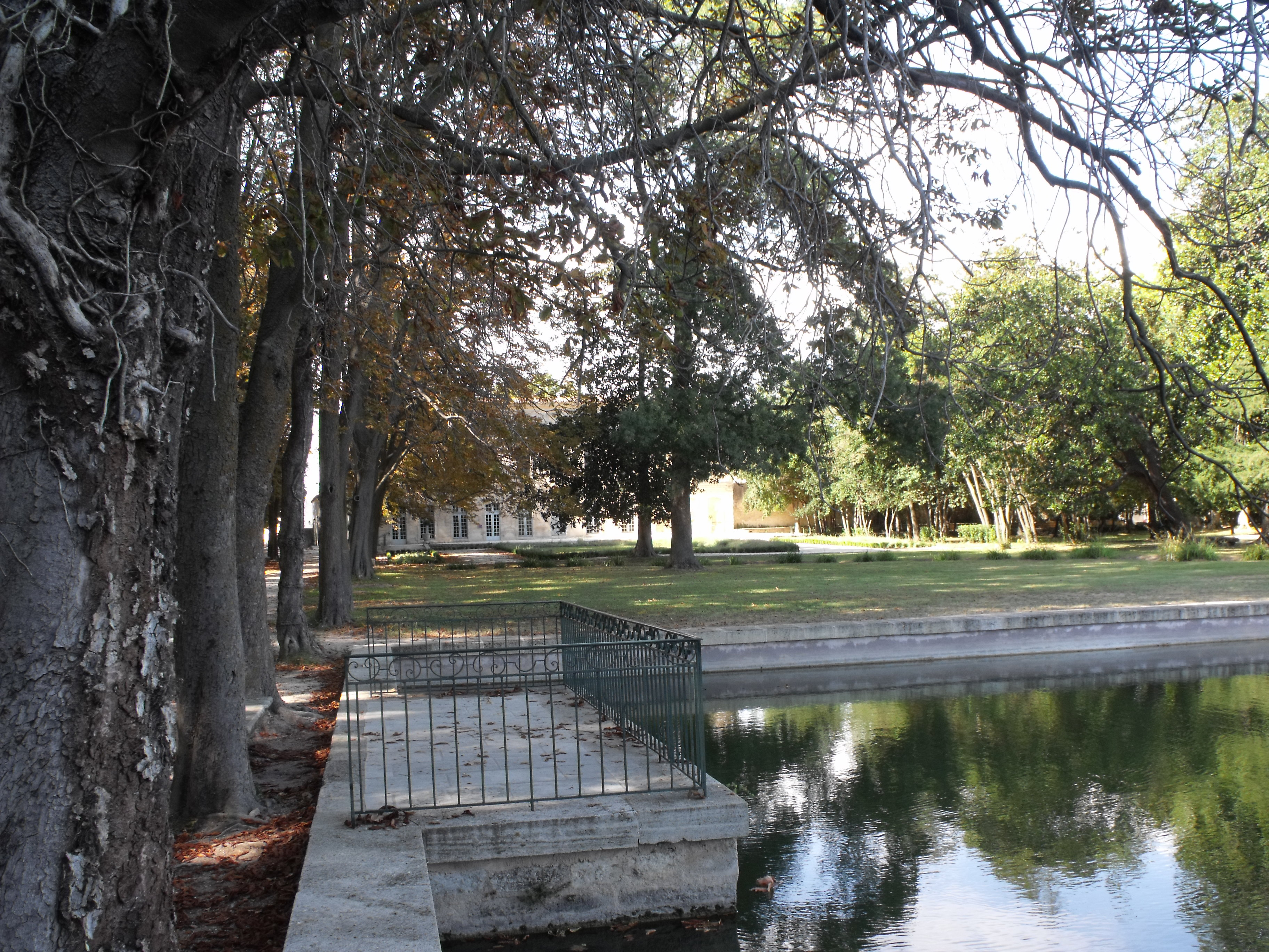 Château des évêques de Montpellier, bassin, jardin, façade sud